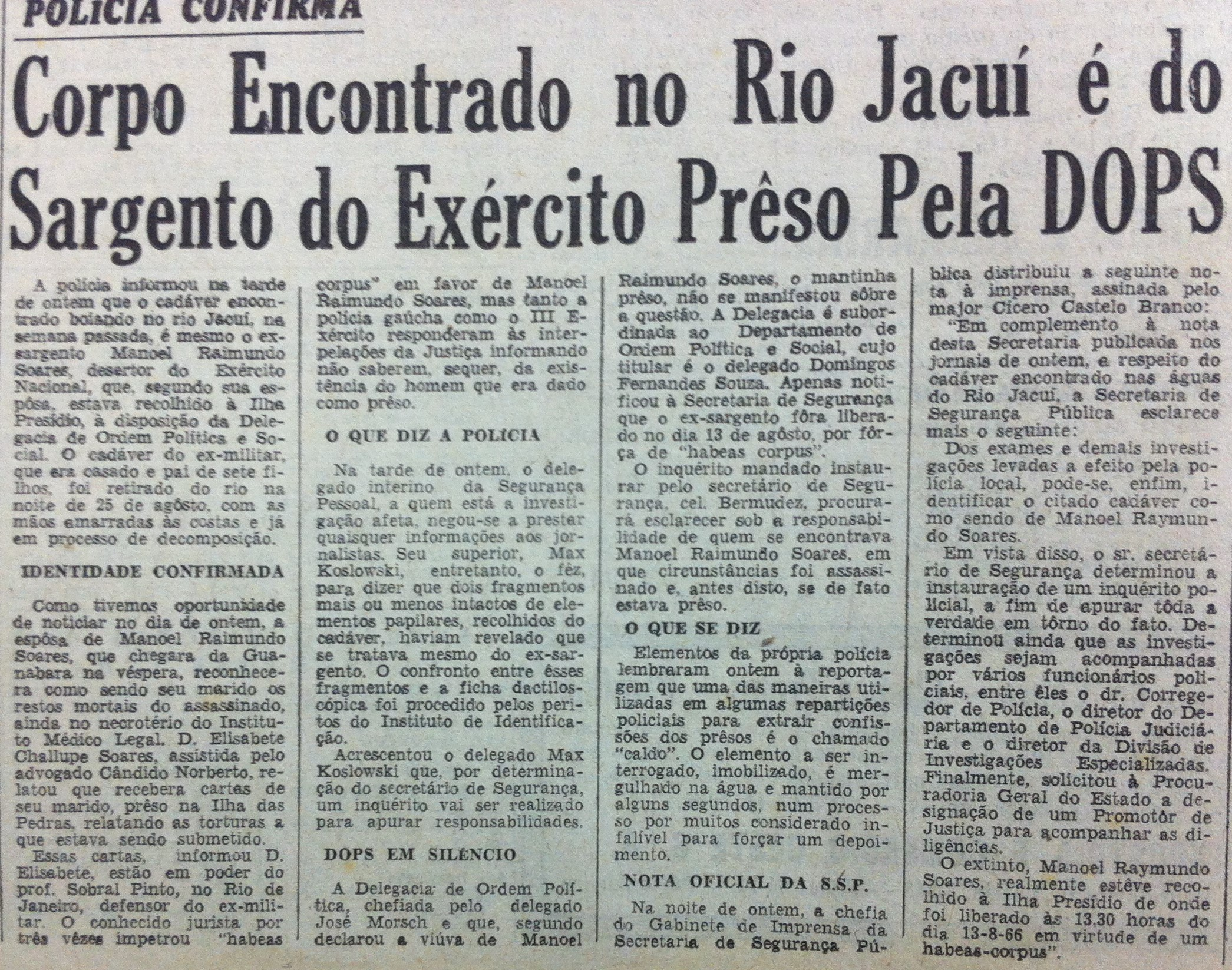 Notícia do Jornal Correio do povo de 1° de setembro de 1966. sobre o caso das mãos amarradas. Foto clicada a partir do acervo do Arquivo Histórico de Porto Alegre Moysés Vellinho.